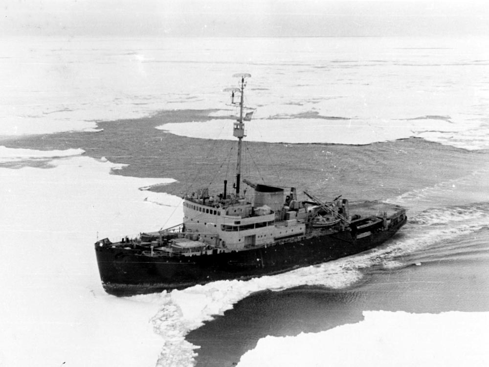 El Rompehielos San Martín en el Weddell, para llegar a Bahía Gold